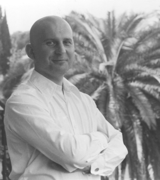 Jan Władysław Woś (Kair 1979)